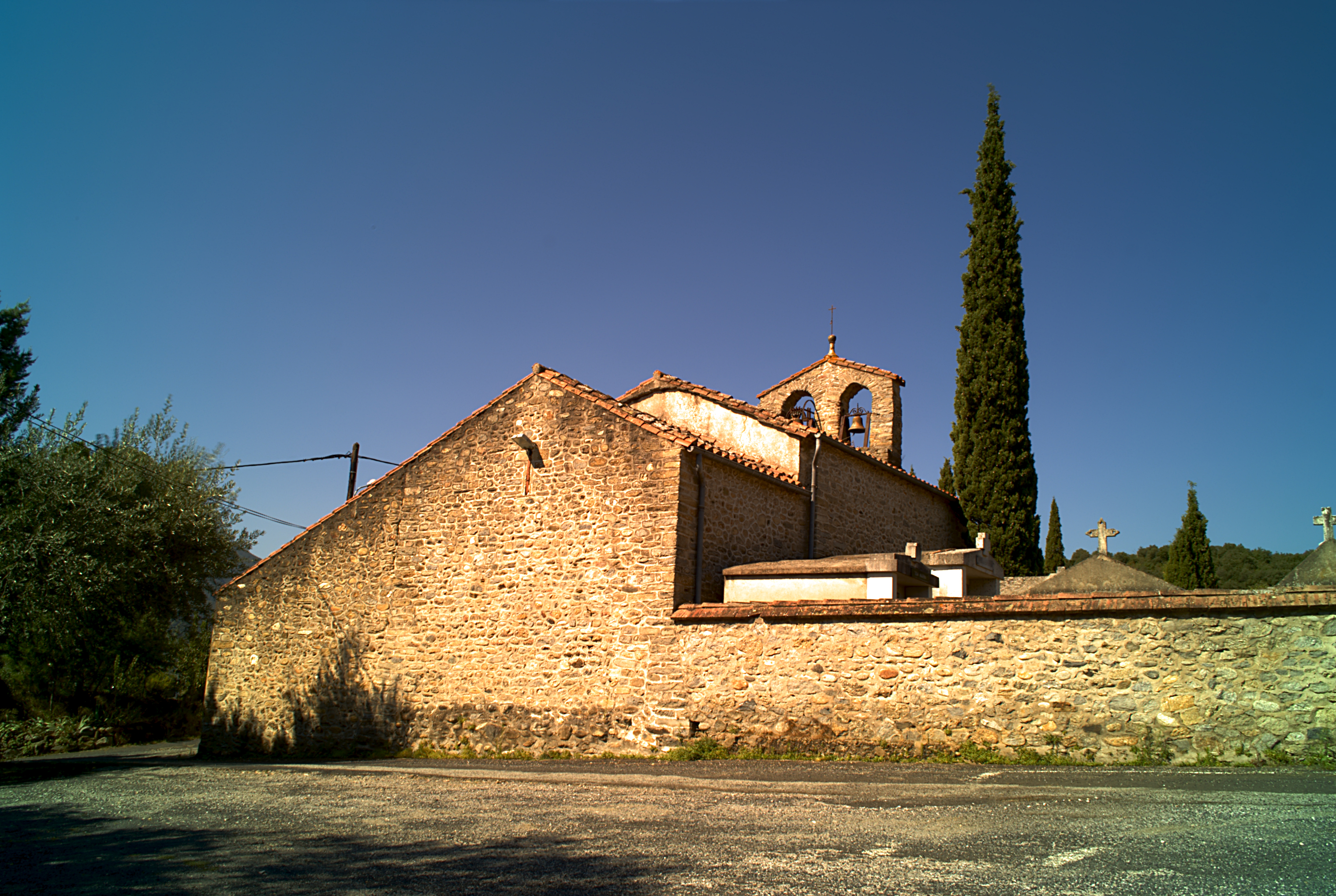 Église Sainte-Marie et cimetière, Le Vila, Reynès (Pyrénées-Orientales, Languedoc-Roussillon, France)